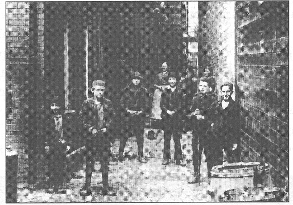 Mullen's Alley, New York.